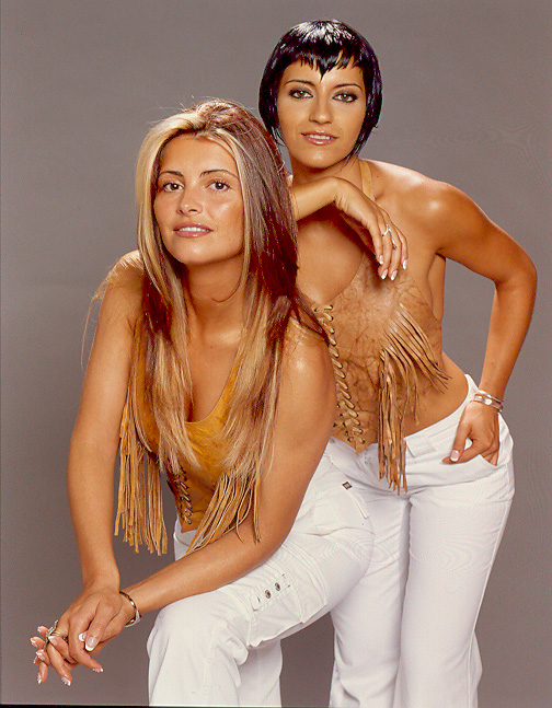 Cantoras